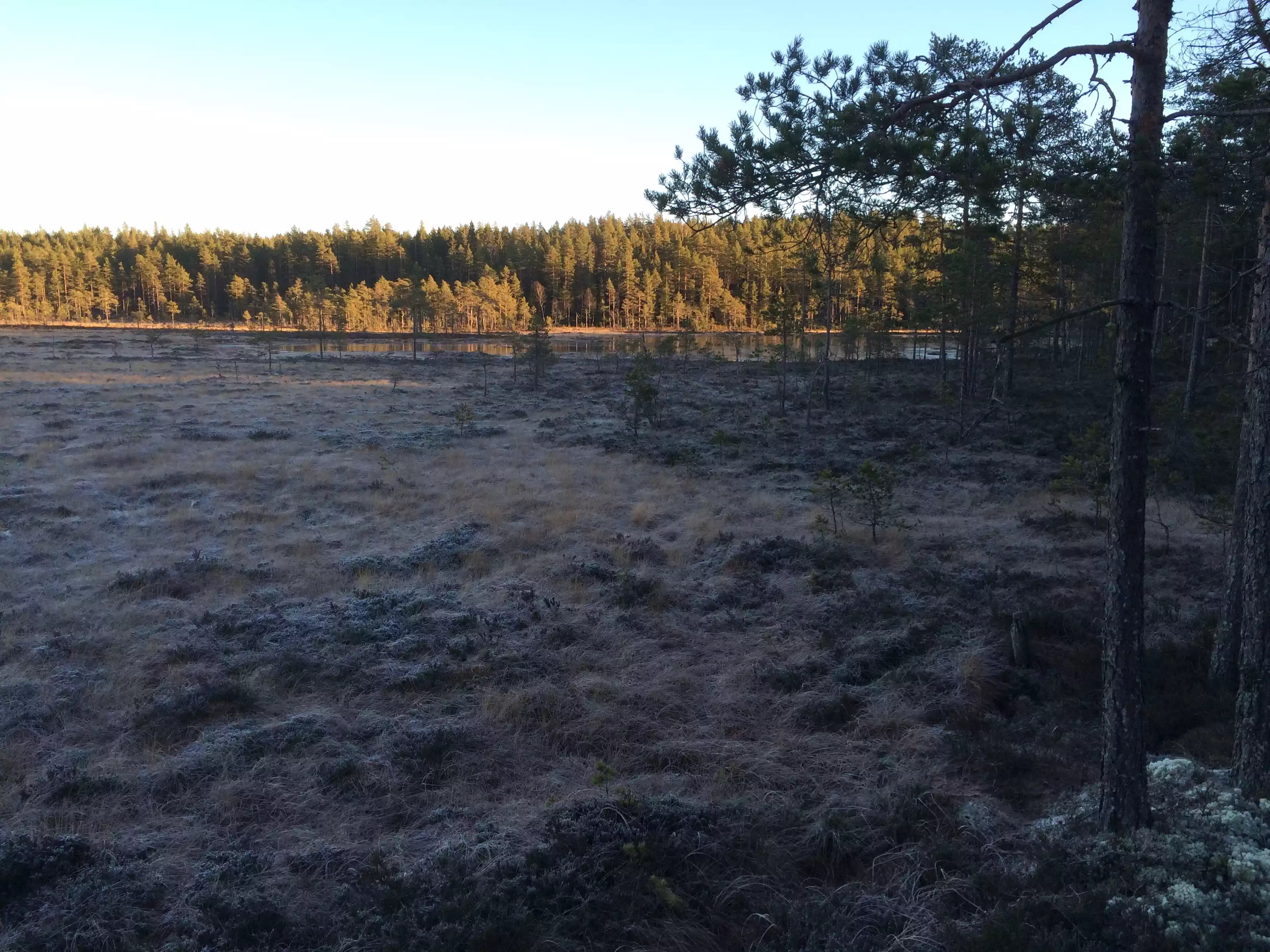 Store Ormtjenn på Lierfoss i Aurskog-Høland kommune.